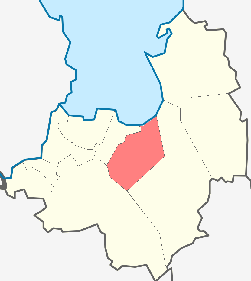 Путиловское сельское поселение Кировского района Ленинградской области.